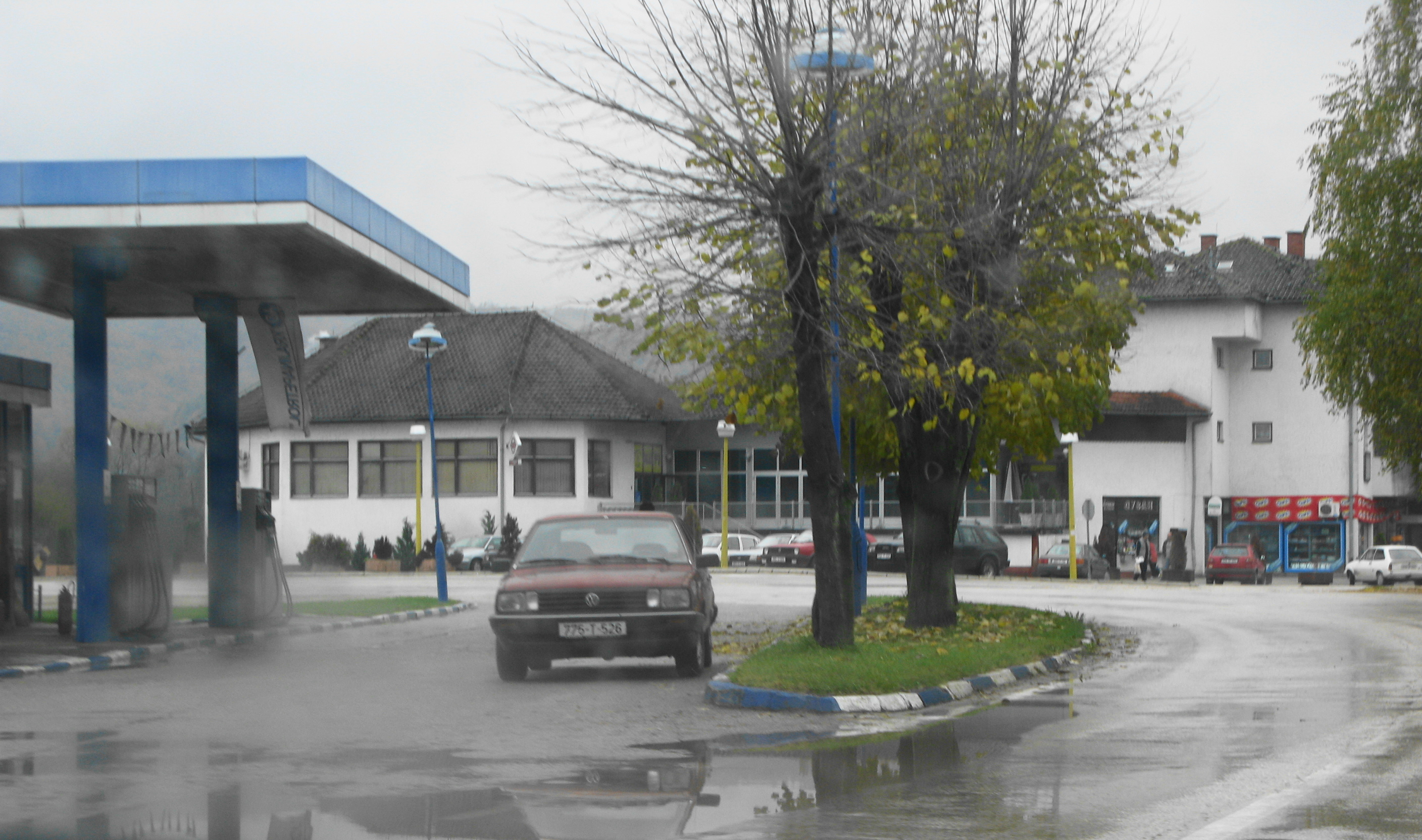 Selo Knežica, Republika Srpska.